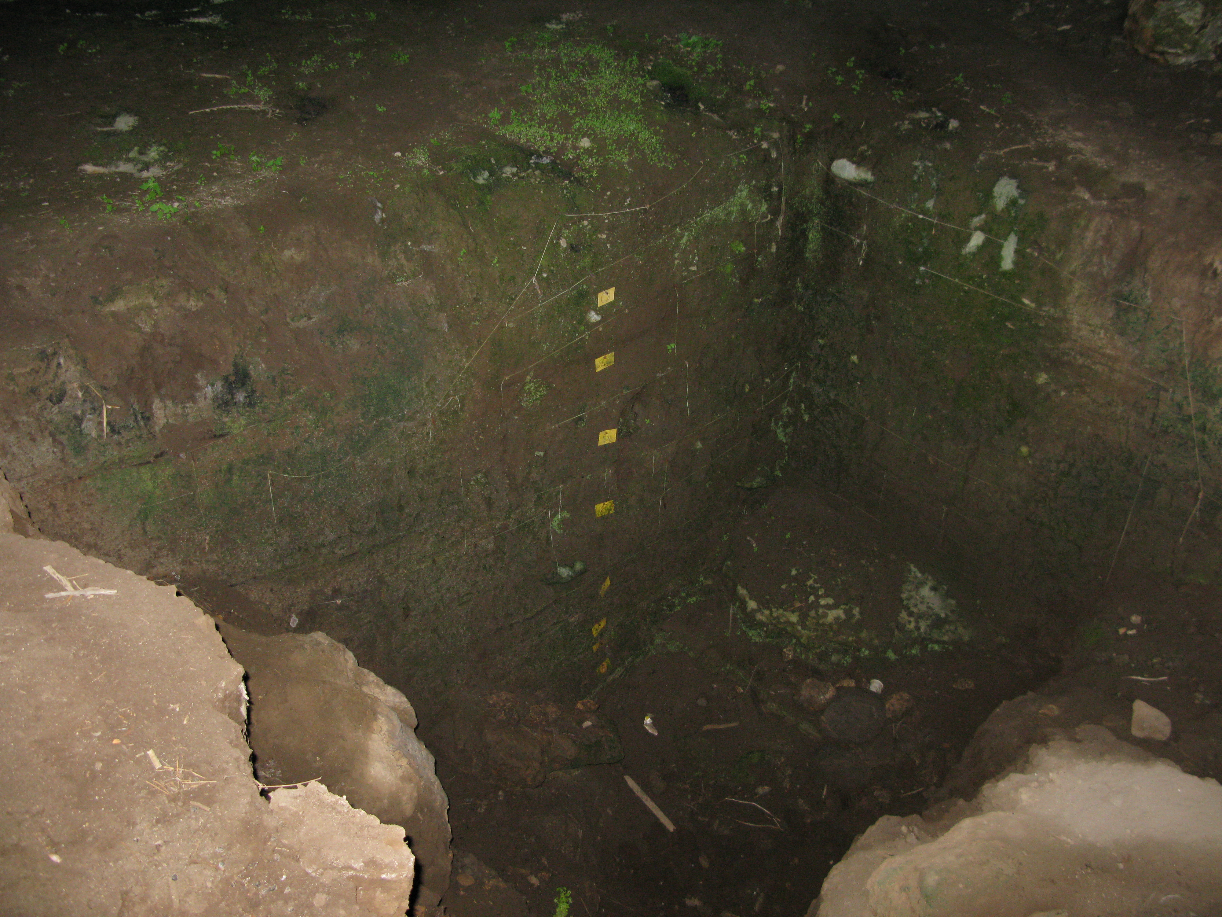 Stratigrafia - Grotta della Pietrosa o di Trachina (Palmi)